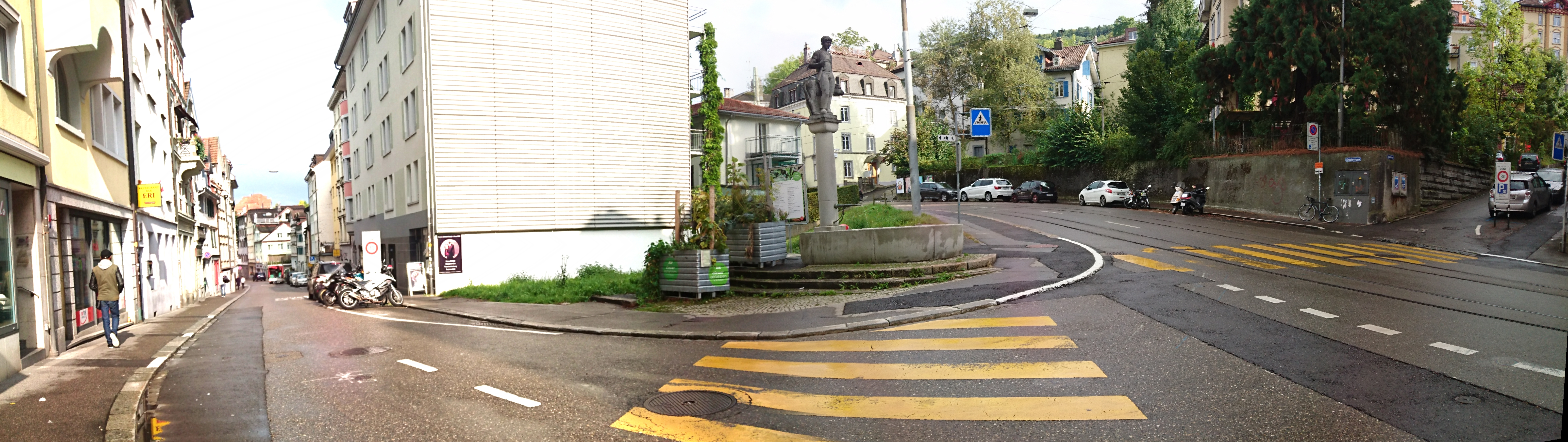 Kreuzung von Linsebühlstrasse-Speicherstrasse-Rotachstrasse in Richtung Südost